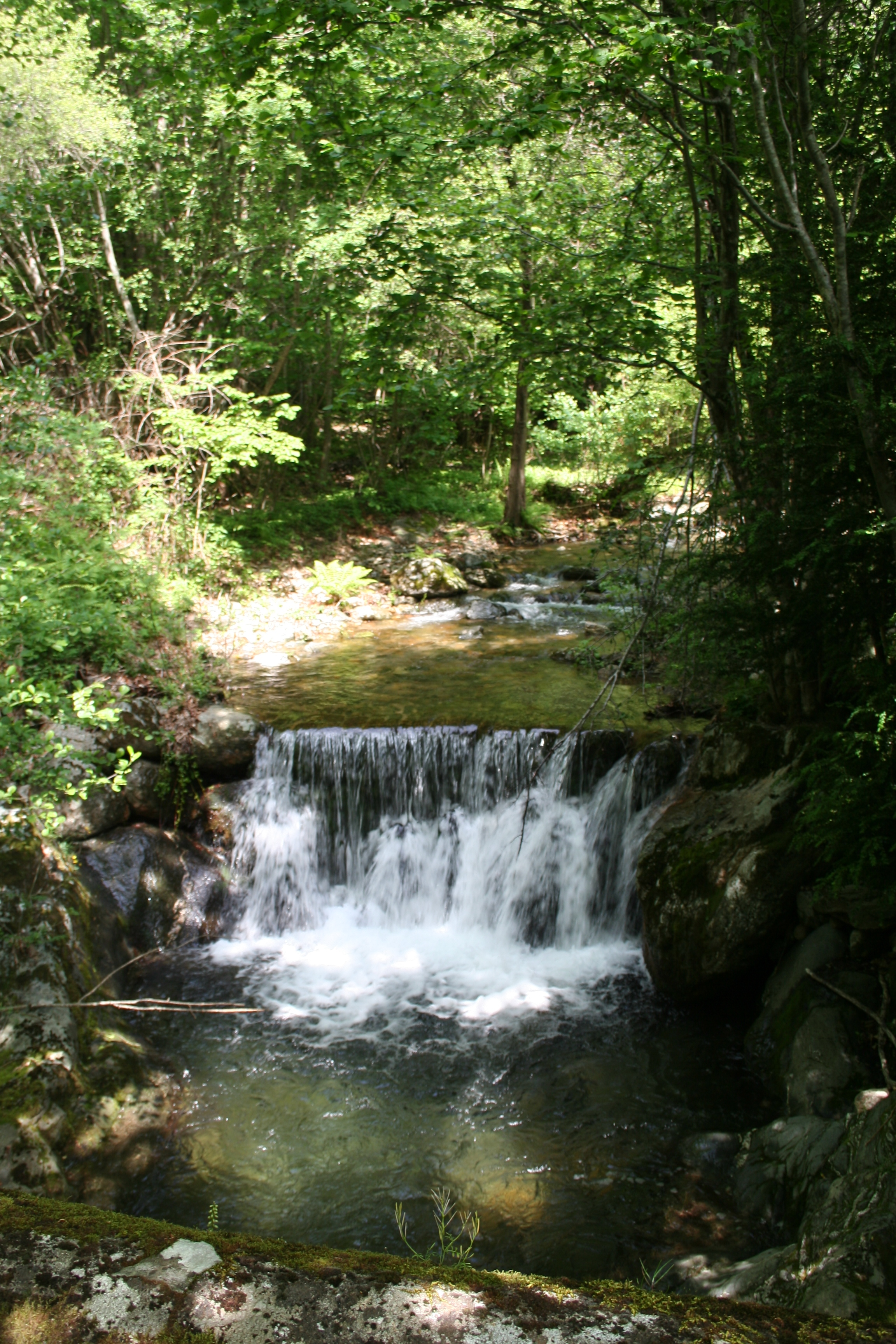 Castanet-le-Haut (Hérault) - la rivière Mare au dessus du pont de la Planque.